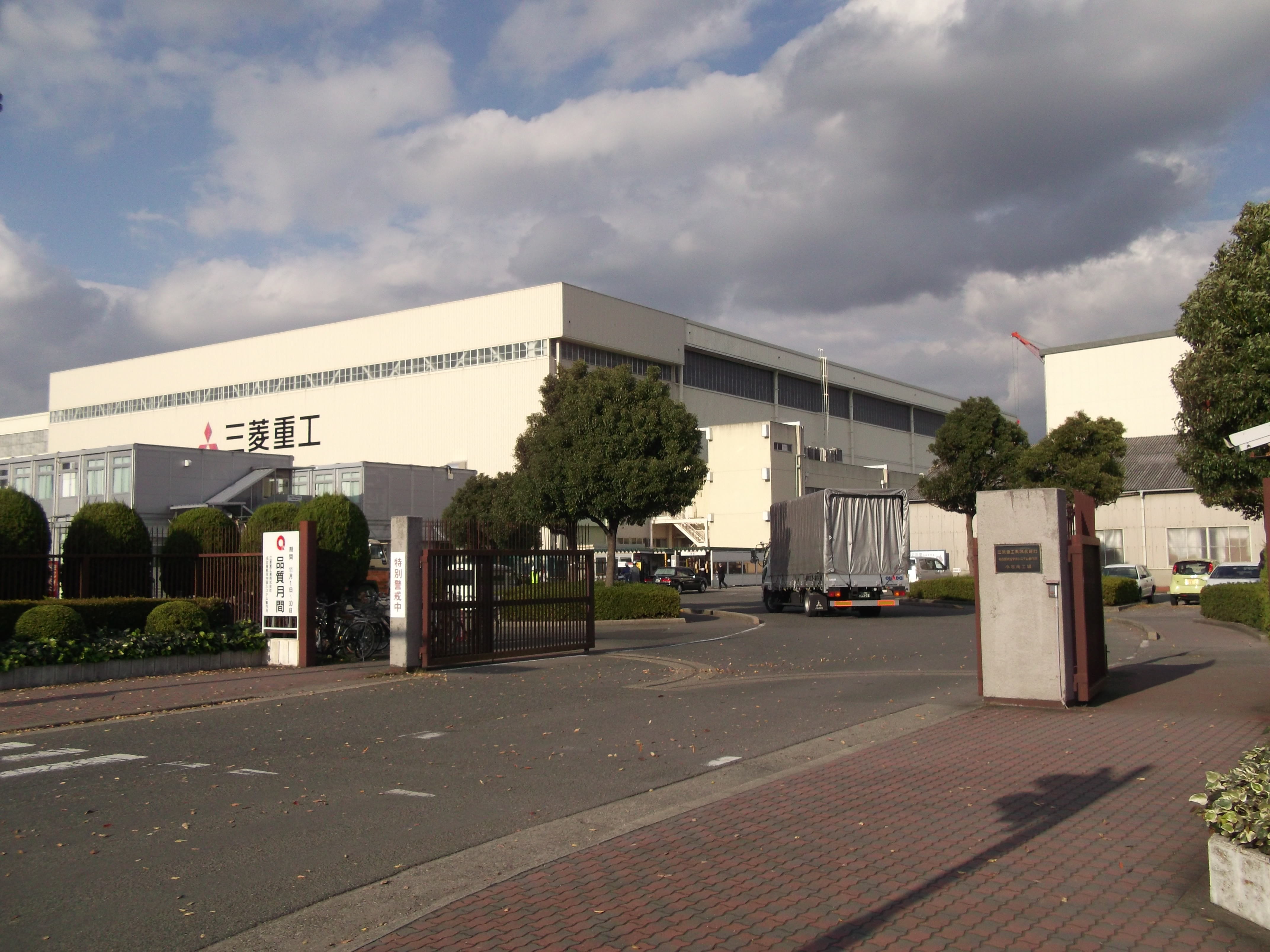 三菱重工業小牧南工場入口